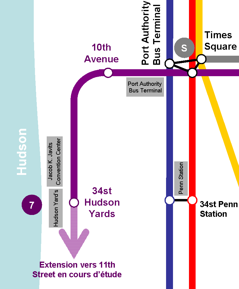 Description du chantier de la Ligne 7 du métro de New-york. réalisée par moi-même.